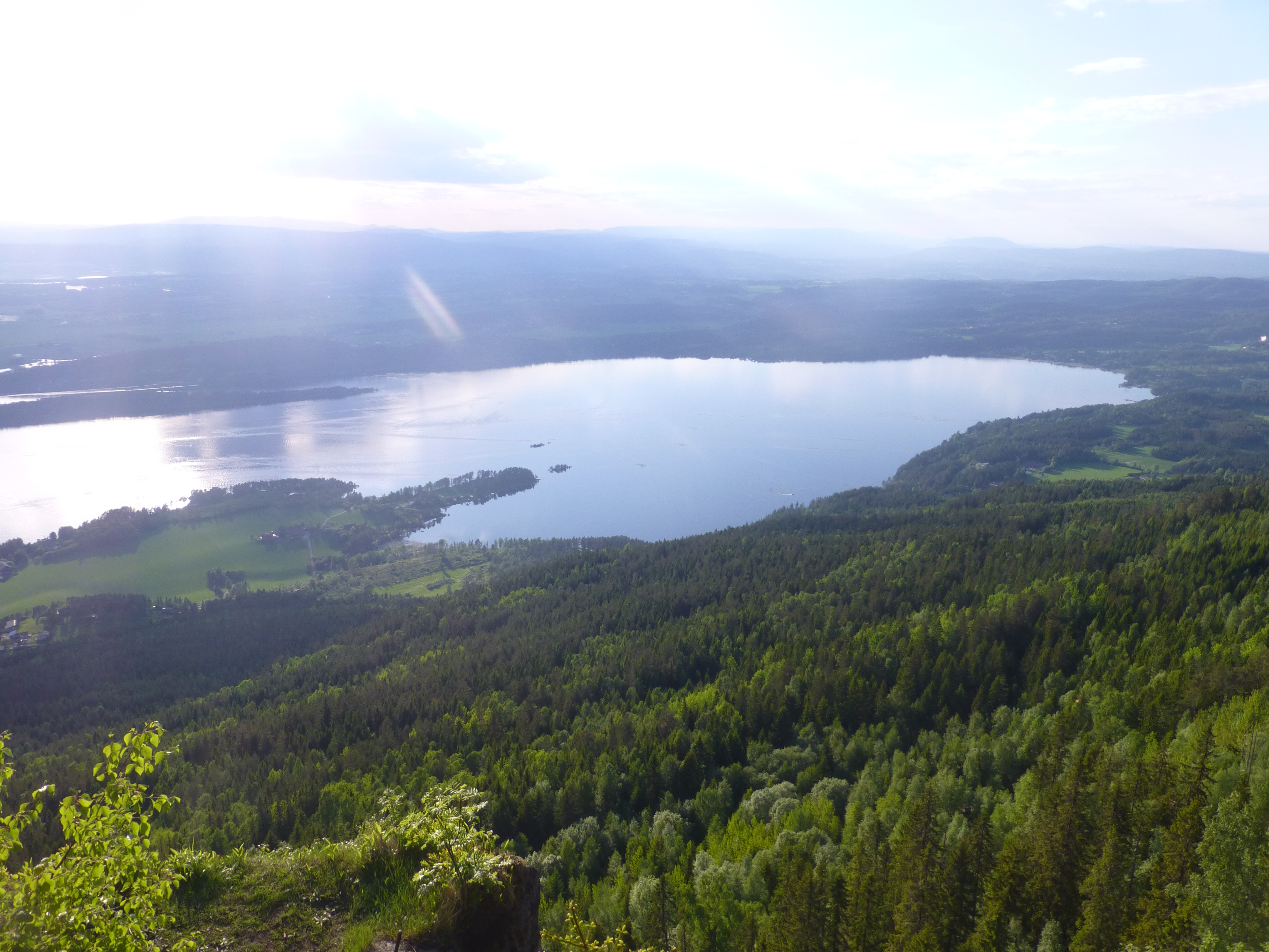 Steinsfjorden sett fra toppen av Mørkgonga i Krokskogen i Åsa.